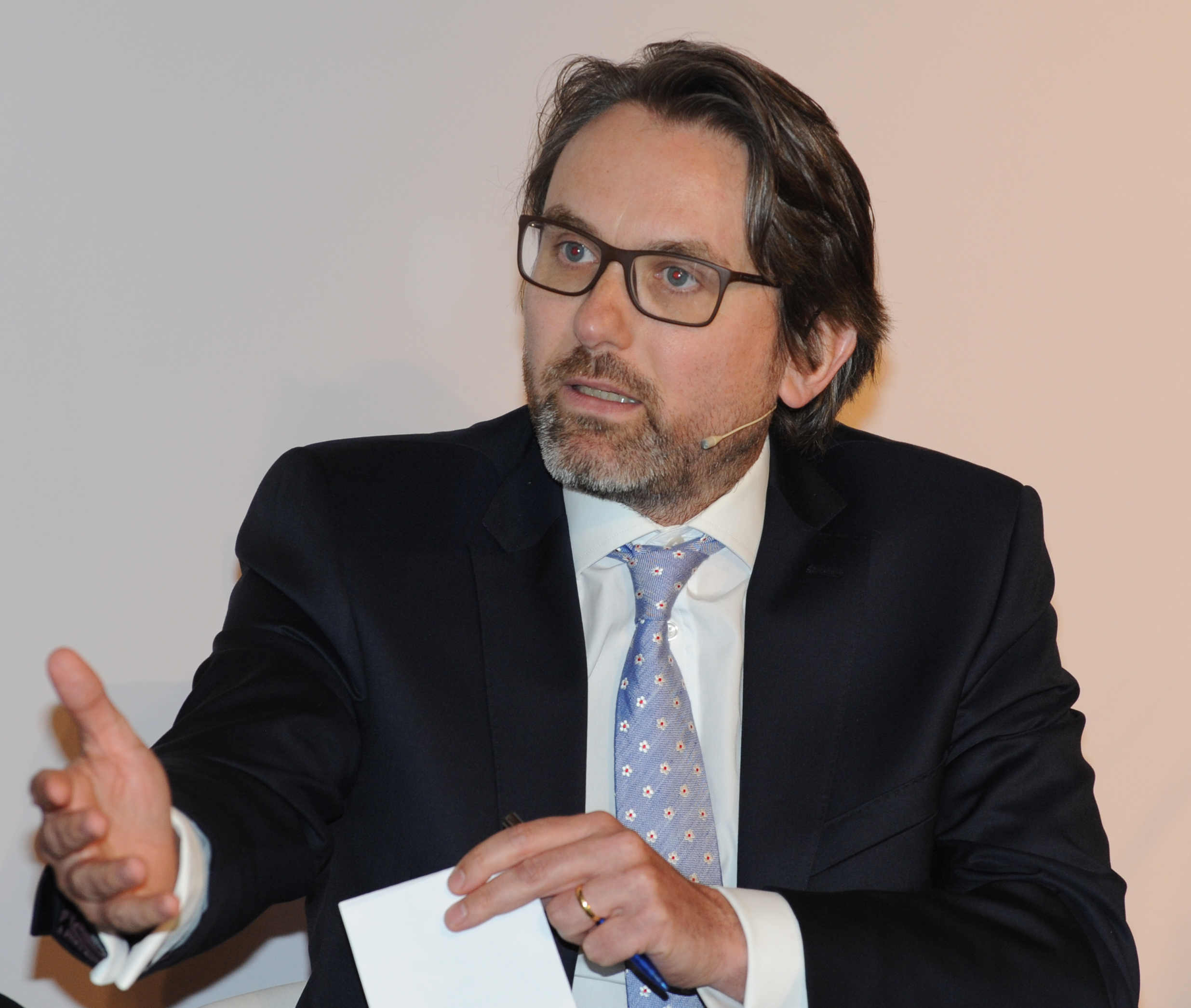 Foto: Prof. Dr. Marc Oliver Bettzüge; Universität zu Köln, Direktor des Energiewirtschaftlichen Instituts (EWI), Köln Über 250 Entscheidungsträger und Experten aus der Energiebranche haben sich heute in Düsseldorf zur Auftaktveranstaltung des „Netzwerks Energiewirtschaft“ der EnergieAgentur.NRW getroffen. Unter dem Titel „Neue Märkte und Geschäftsmodelle für die Energiewirtschaft“ ging es darum, wirtschaftliche Zukunftschancen und Perspektiven für die Nutzung innovativer Energiesysteme in Nordrhein-Westfalen auszuloten. Das neugegründete Netzwerk bündelt die in NRW vorhandenen Kompetenzen in Forschung, Entwicklung und Produktion rund um den Energiemarkt der Zukunft. Träger des Netzwerks, das bereits über 430 Mitglieder hat, ist das nordrhein-westfälische Wirtschaftsministerium, koordiniert wird es von der EnergieAgentur.NRW.